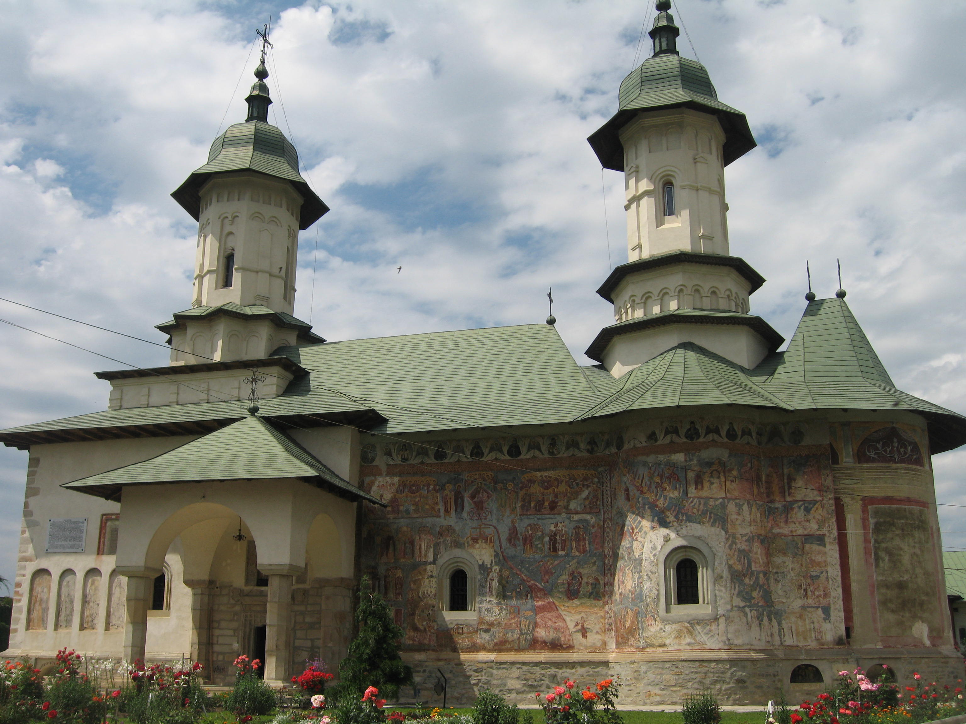 Mănăstirea Râşca 01